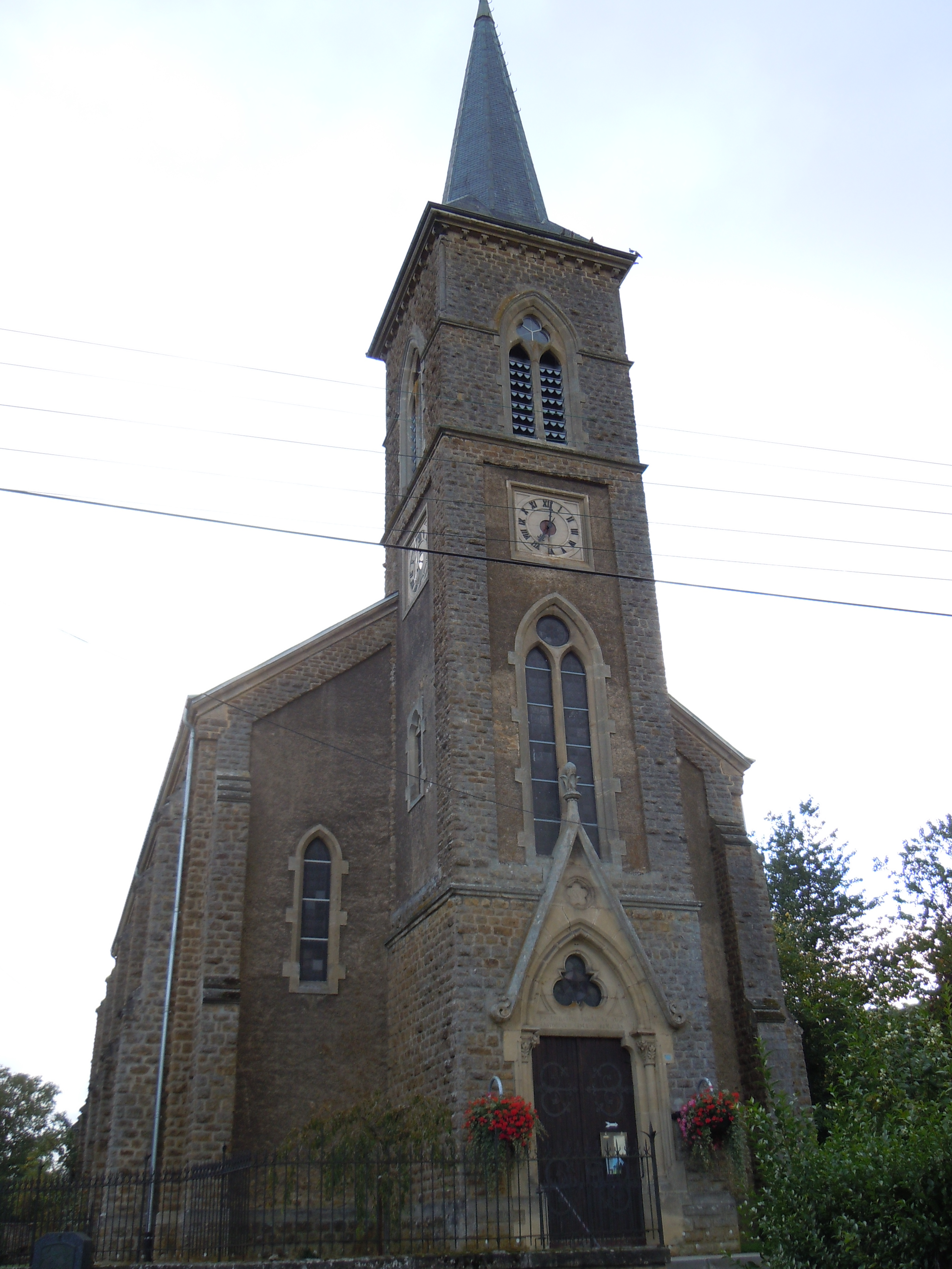 L'église Saint-Remacle dans le village belge de Hondelange